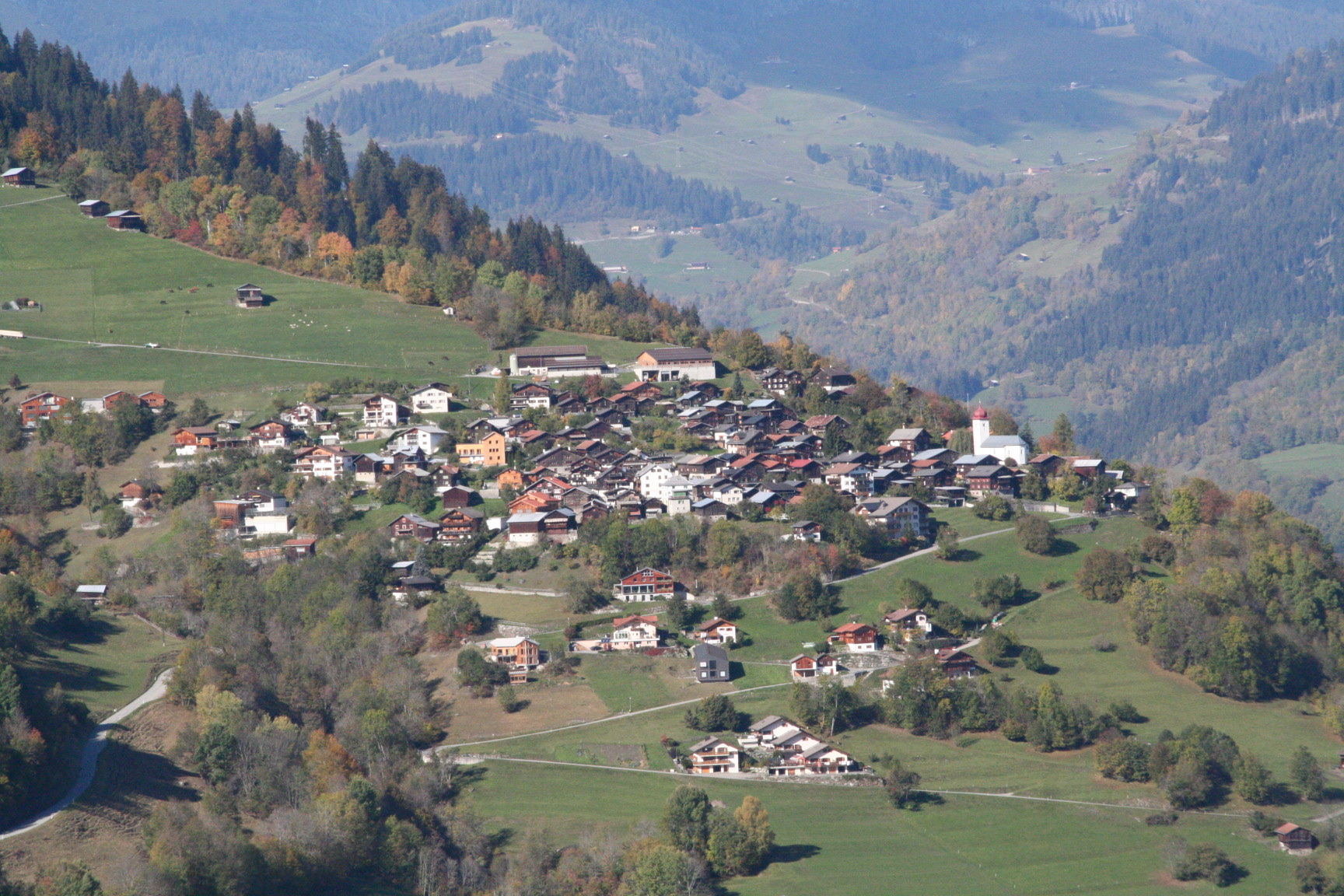 Luven